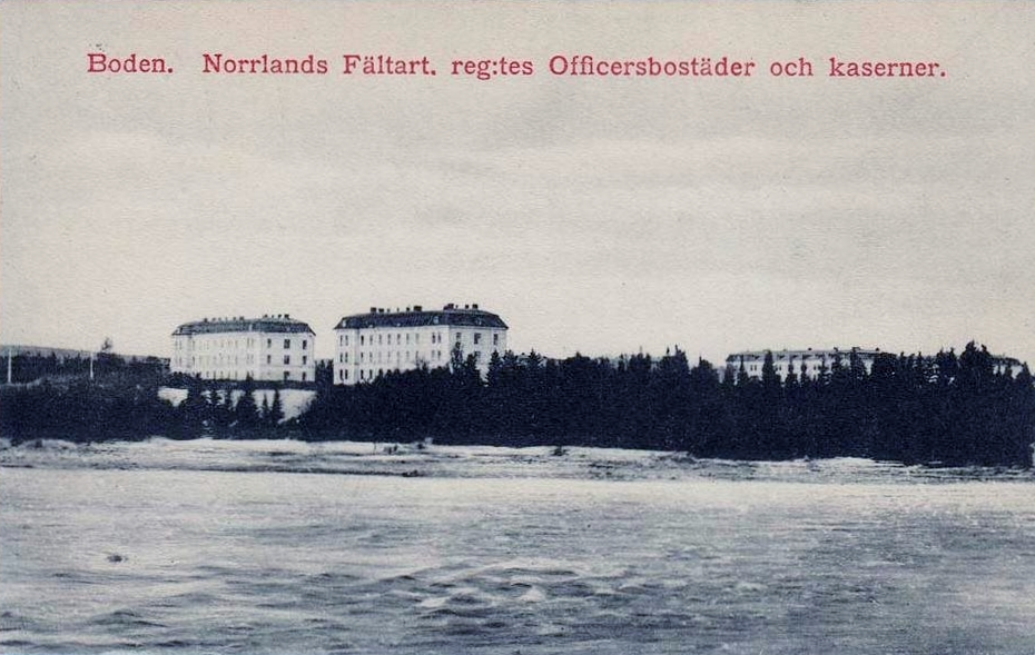 Officersbostäder vid Hedenbrovägen i Boden. I bakgrunden skymtas kasernerna vid Norrbottens artillerikår (A 5).